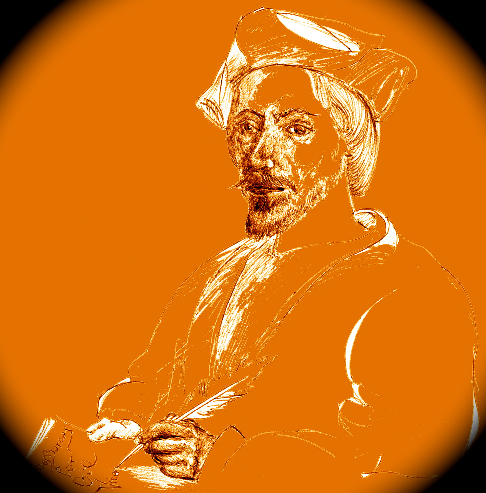 Gil Vicente escrivendo um Auto da barca